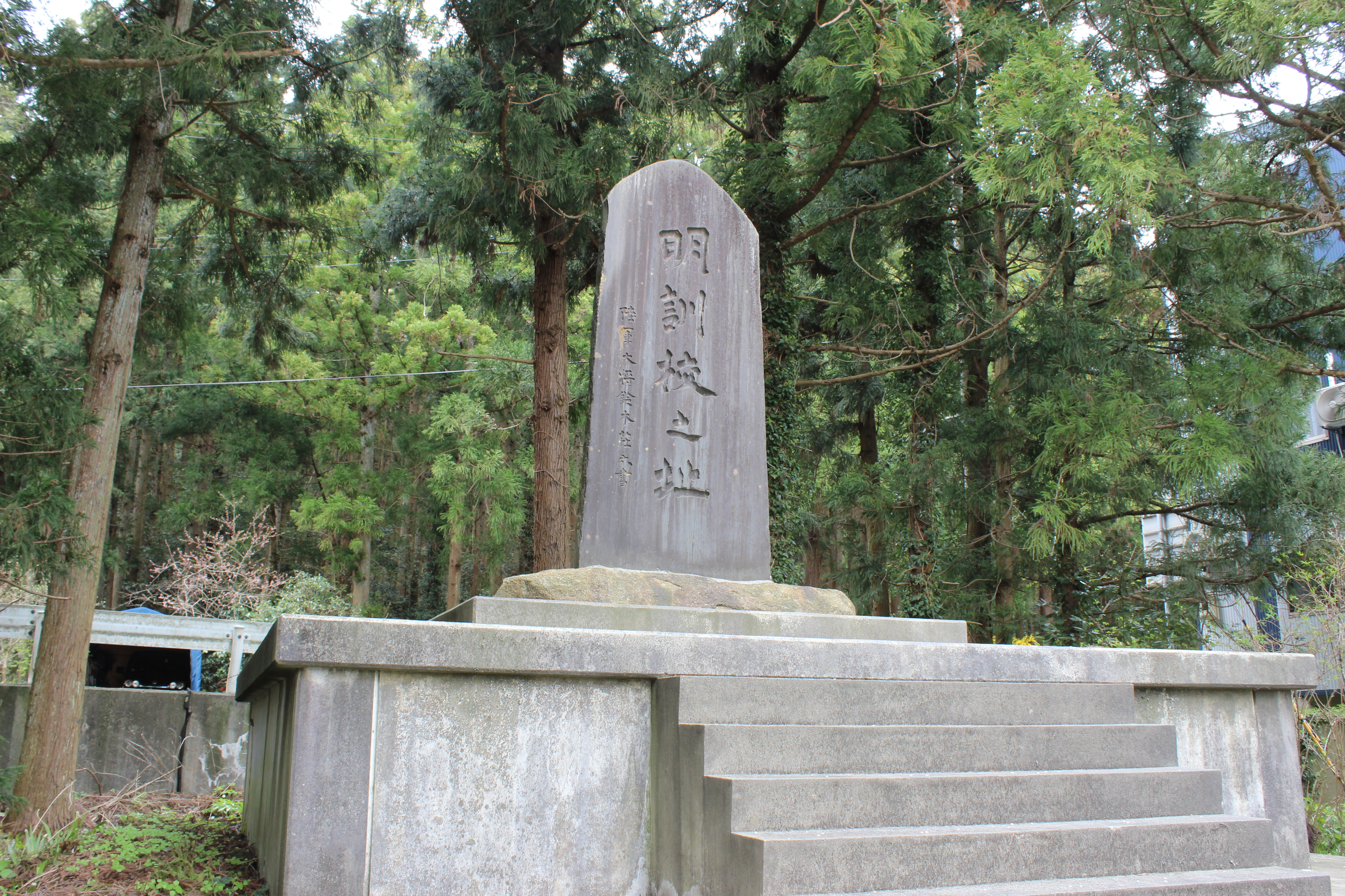 弥彦村景観史跡「明訓校之址」。新潟県西蒲原郡弥彦村大字弥彦の弥彦村商工会館脇。